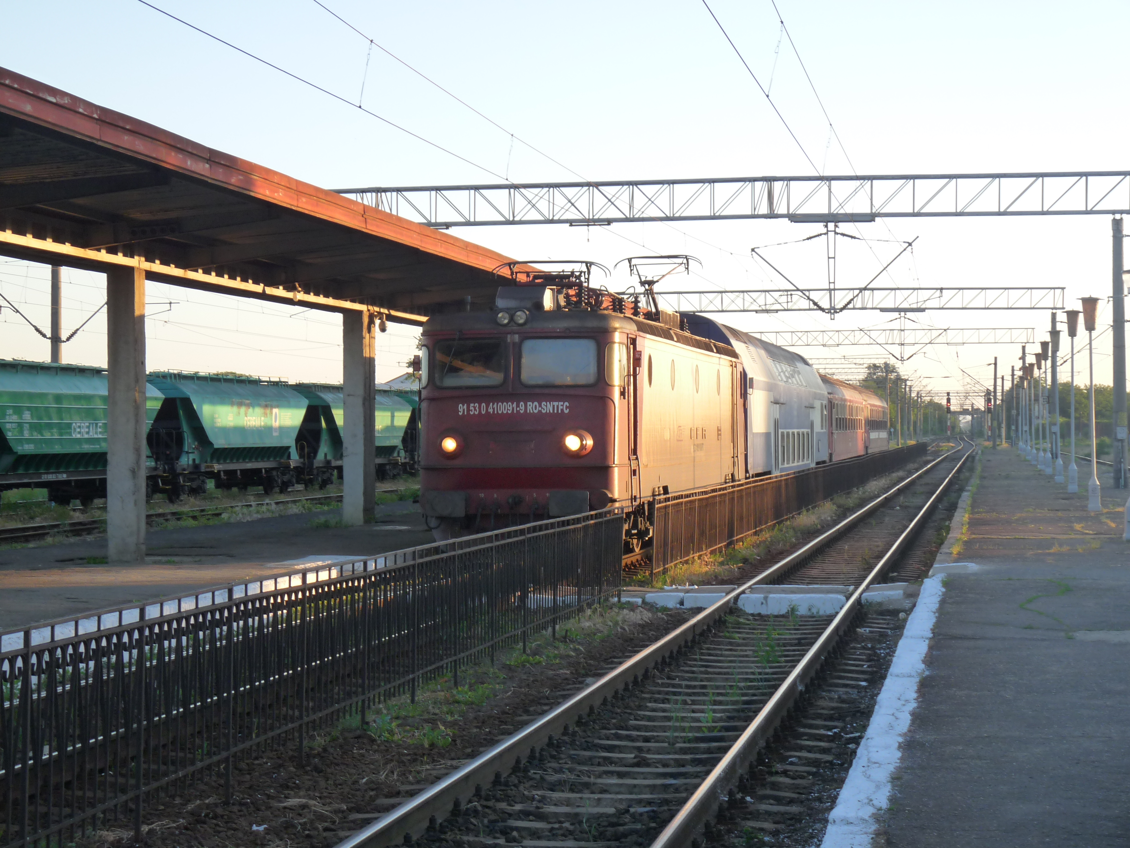 Station Focșani